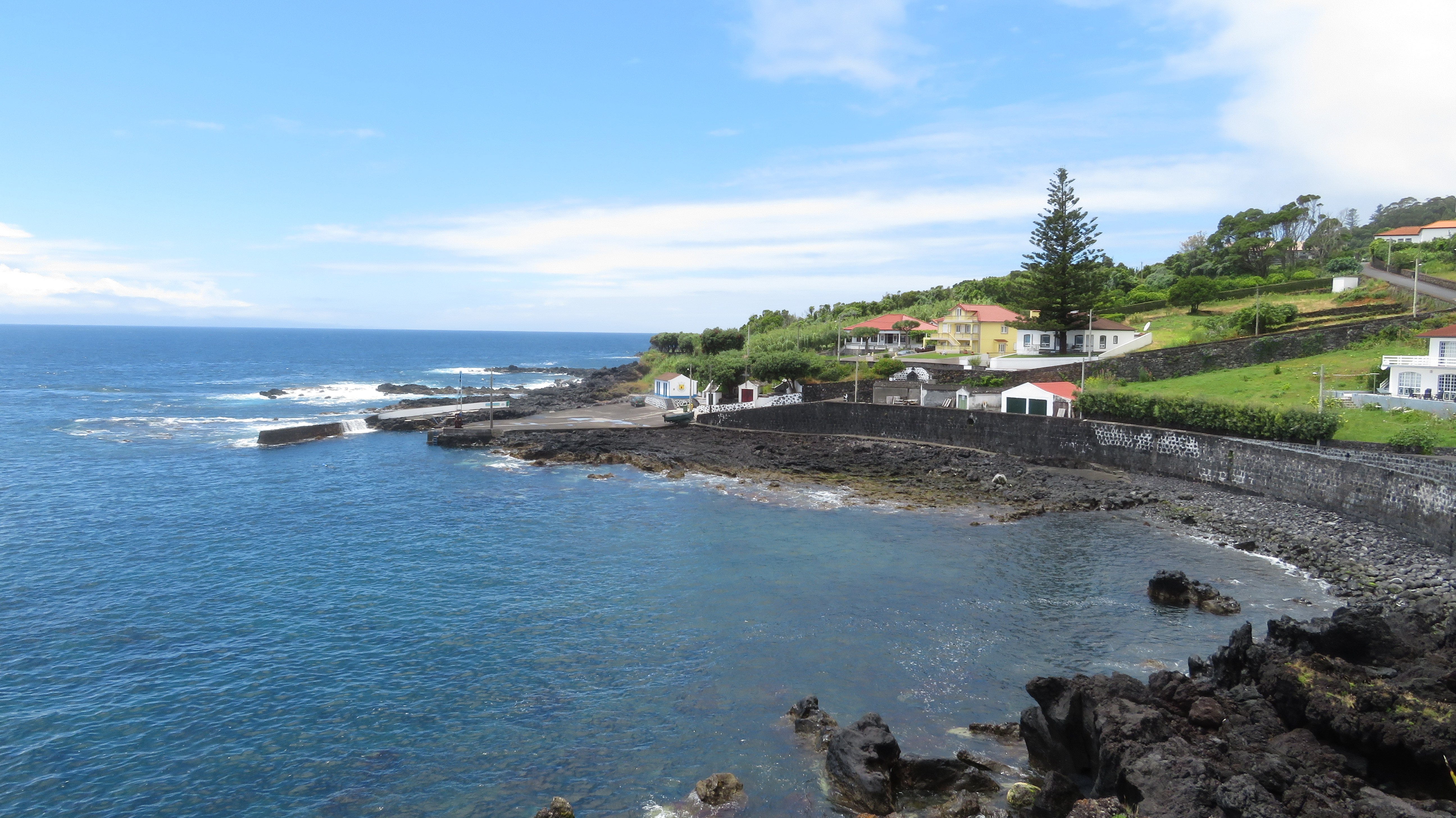 Hafen von Manadas, Insel Sao Jorge, Azoren, Portugal